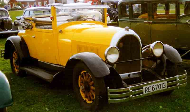 Kissel Convertible Coupé 1927